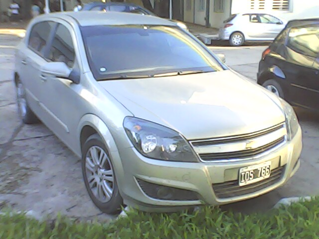 Chevrolet Vectra GT de segunda generación